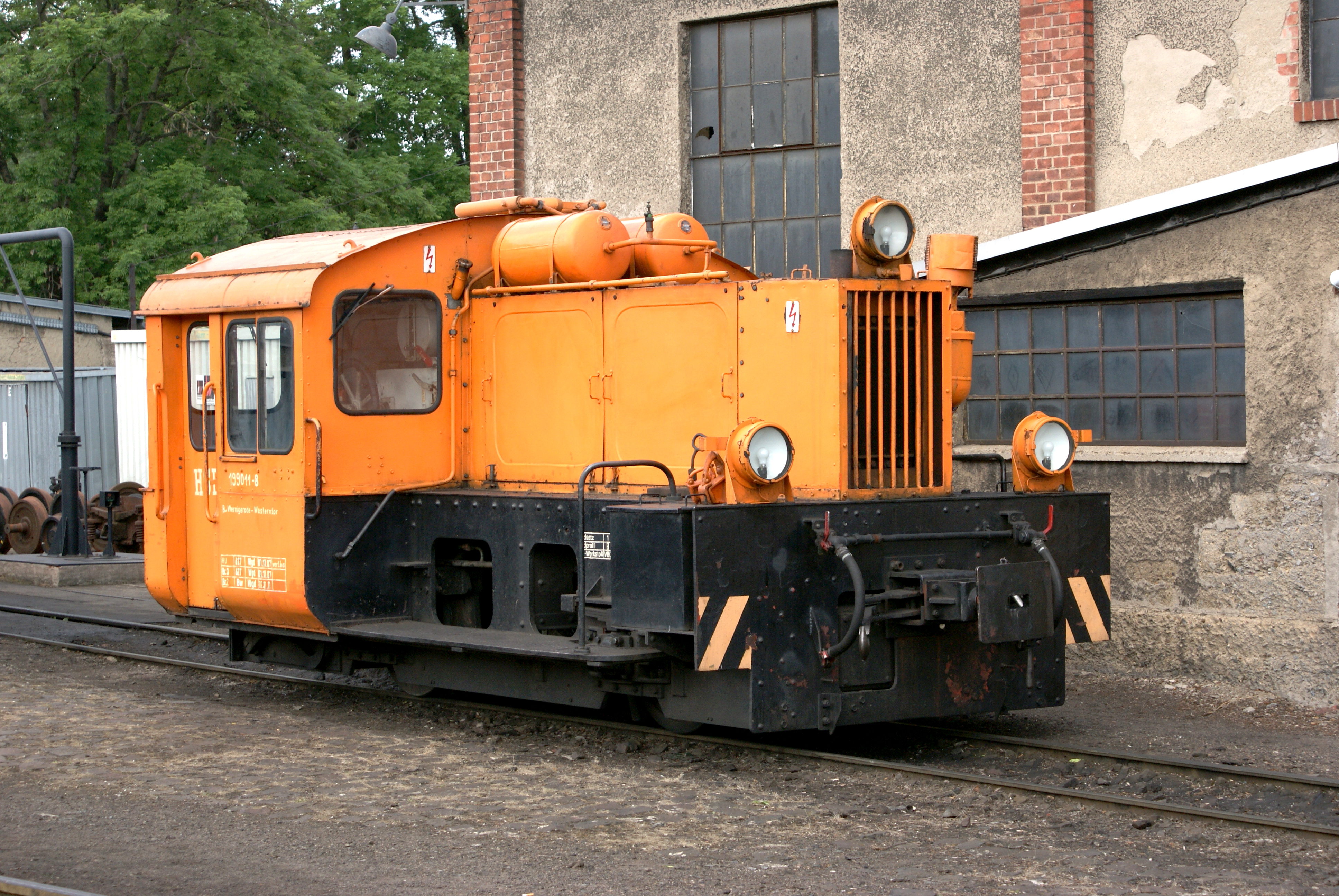 Diesellokomotive 199 011 der HSB (1991 umgespurt aus DR 100 639 ex DR Kö 4639) B dm im Bw Wernigerode Westerntor am 09.Juni 2012